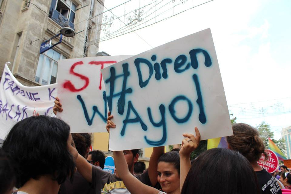 LGBT Onur Haftası, 21. LGBT Onur Yürüyüşü, 2013, Taksim, İstanbul.